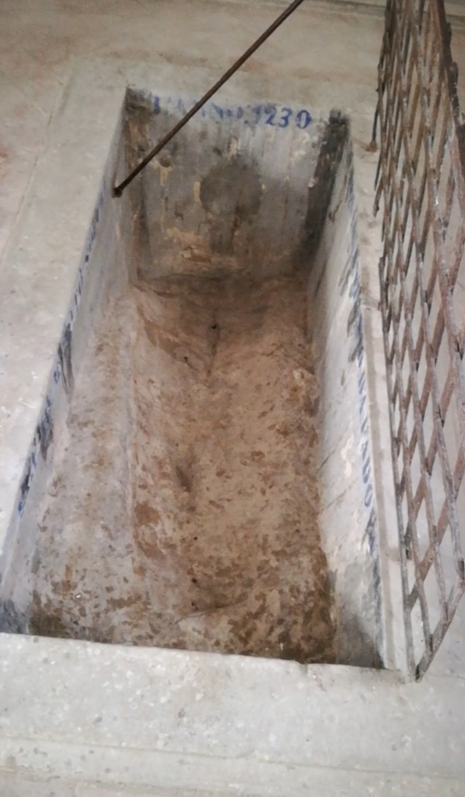 "Letto di Sant'Antonio" presso il Santuario di "Sant'Antonio alla macchia (Eremo di Cerbaiolo)